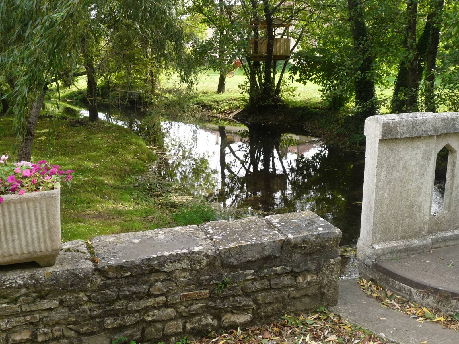 L'Argentor à Poursac, Charente, France